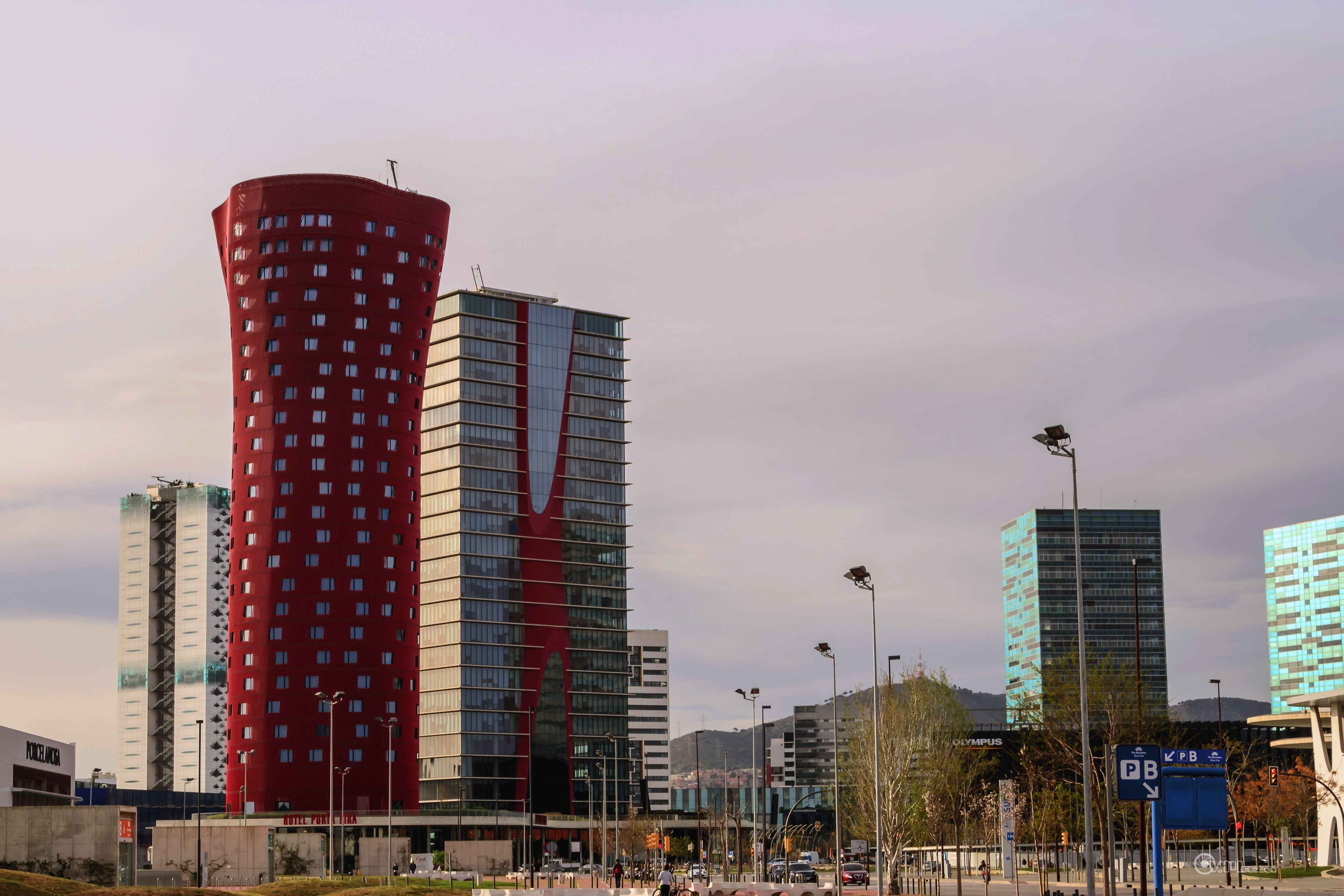 L'Hospitalet de Llobregat, Barcelona, Spain